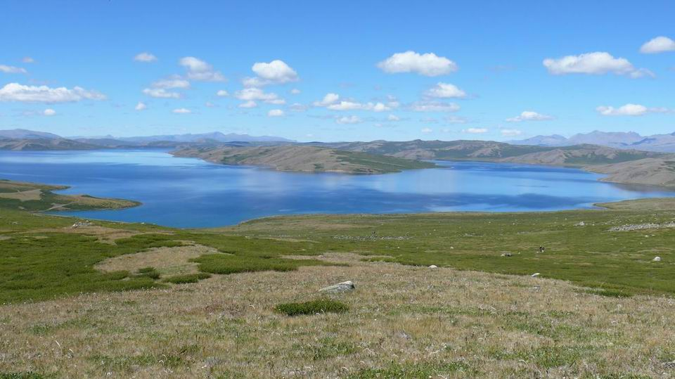 Озеро Хиндиктиг-Холь в Туве